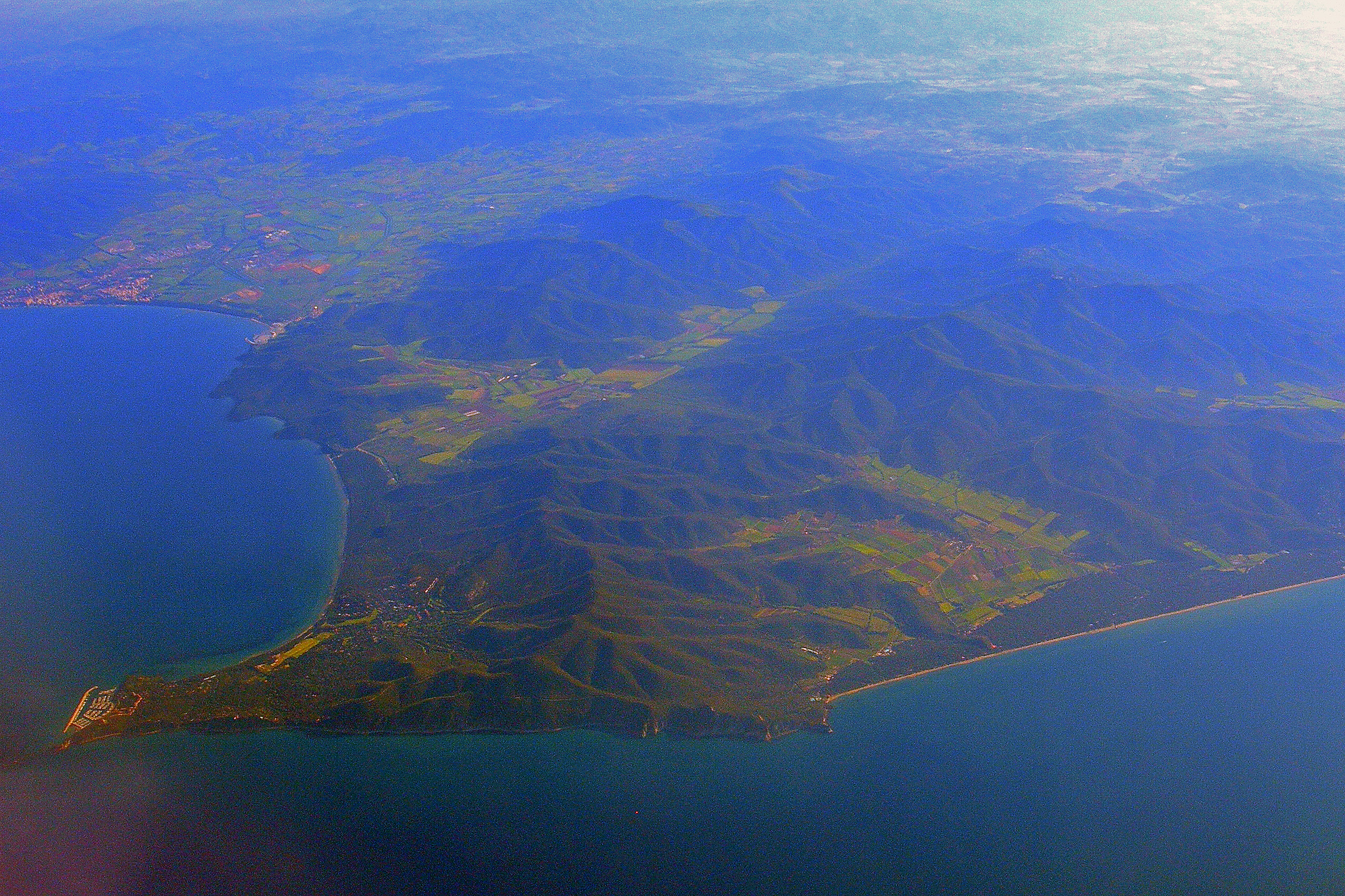 Vista aerea di Punta Ala, Grosseto, aprile 2010